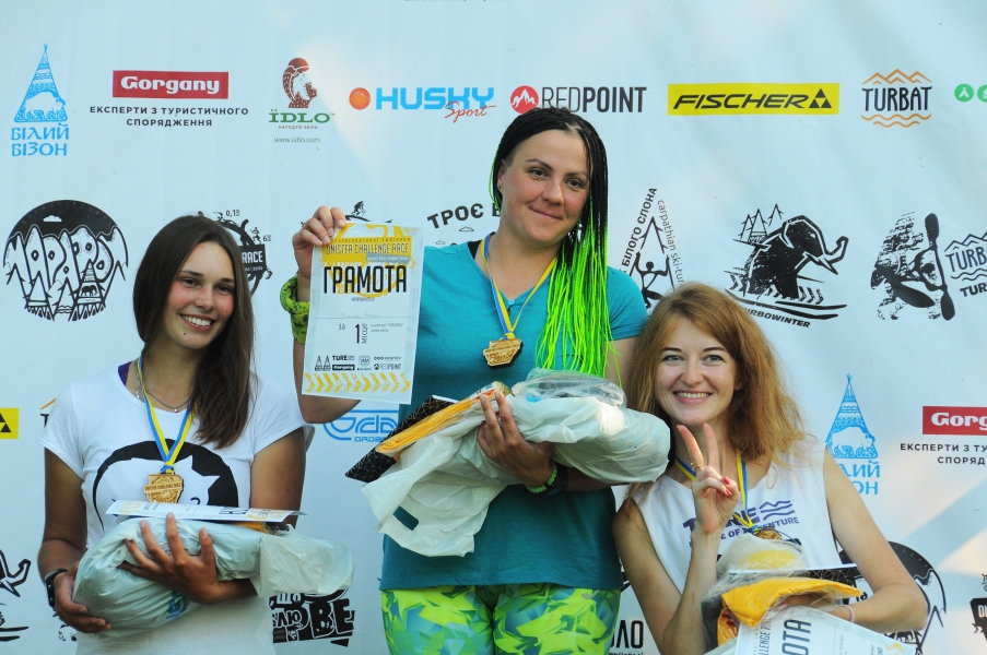 Справа наліво: Тетяна Вербицька (ІІІ місце), Наталія Філатова (І місце), Дарина Гаврищук (ІІ місце)